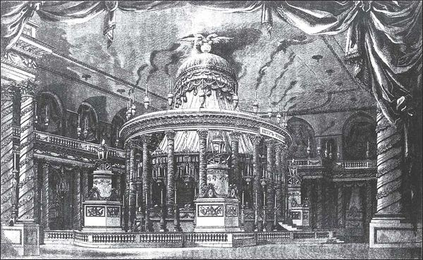 Casrum Doloris Петра III в Зимнем Дворце. 1796 г. Гравюра Майера